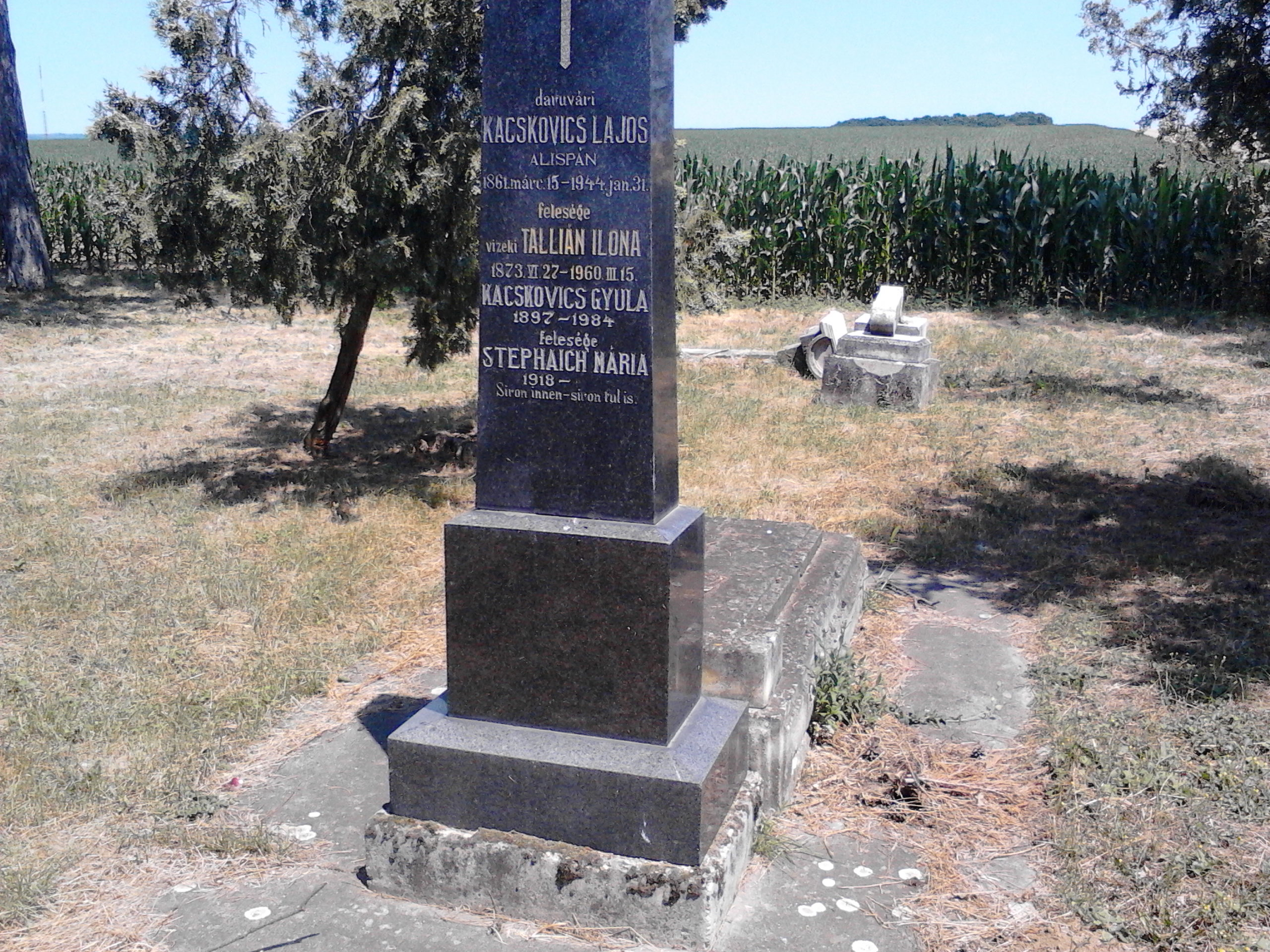 Kacskovics Lajos és családja síremléke Magyaratád-Tátompusztán.